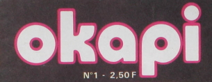 Titre du numéro 1 de la revue Okapi.